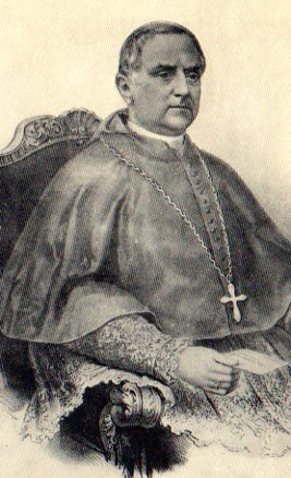 Immagine del cardinale Carlo Luigi Morichini (1805-1879).